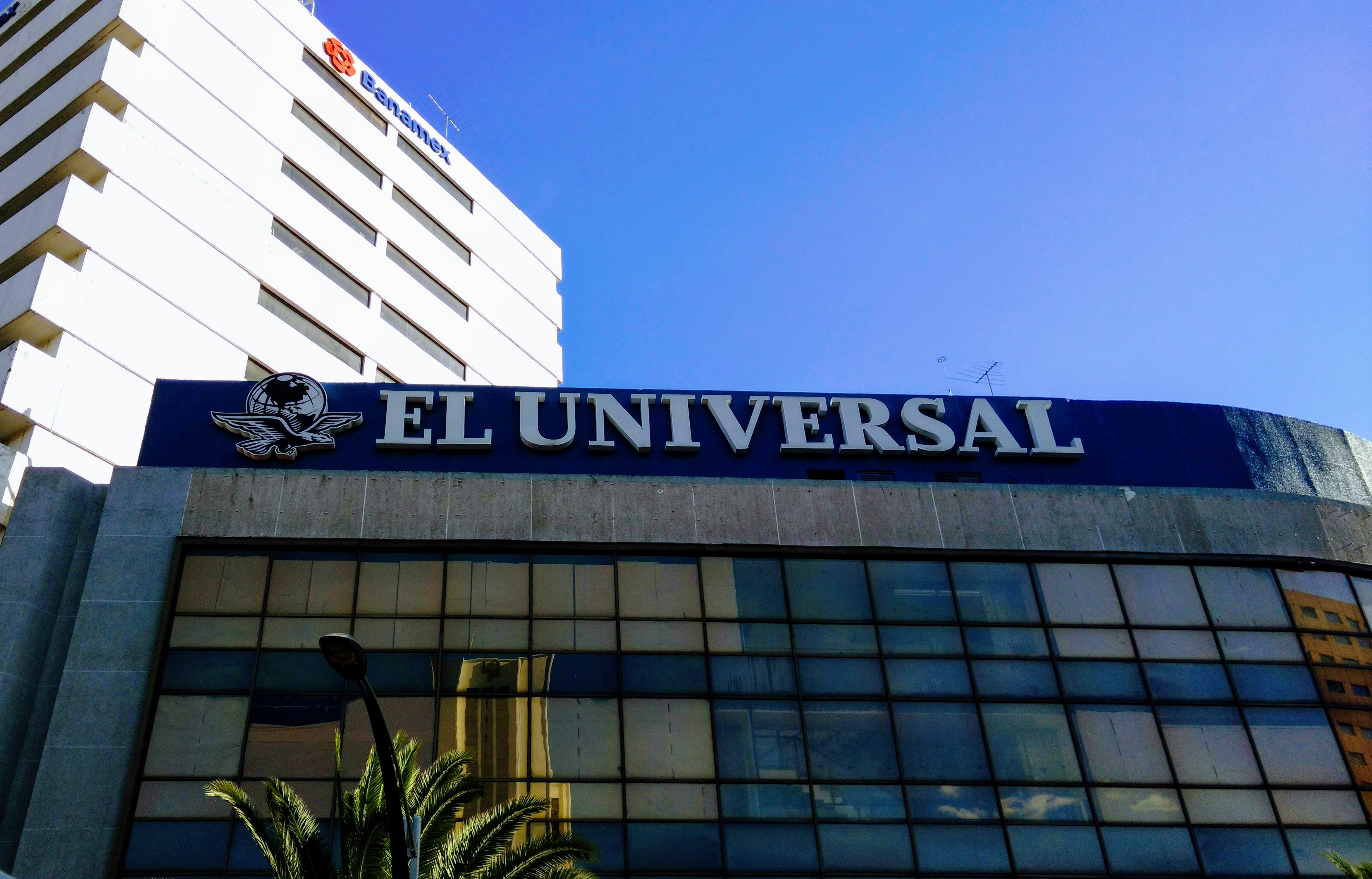 Una de las fachadas de los edificios que conforman la sede de El Universal en Paseo de la Reforma y avenida Bucareli.